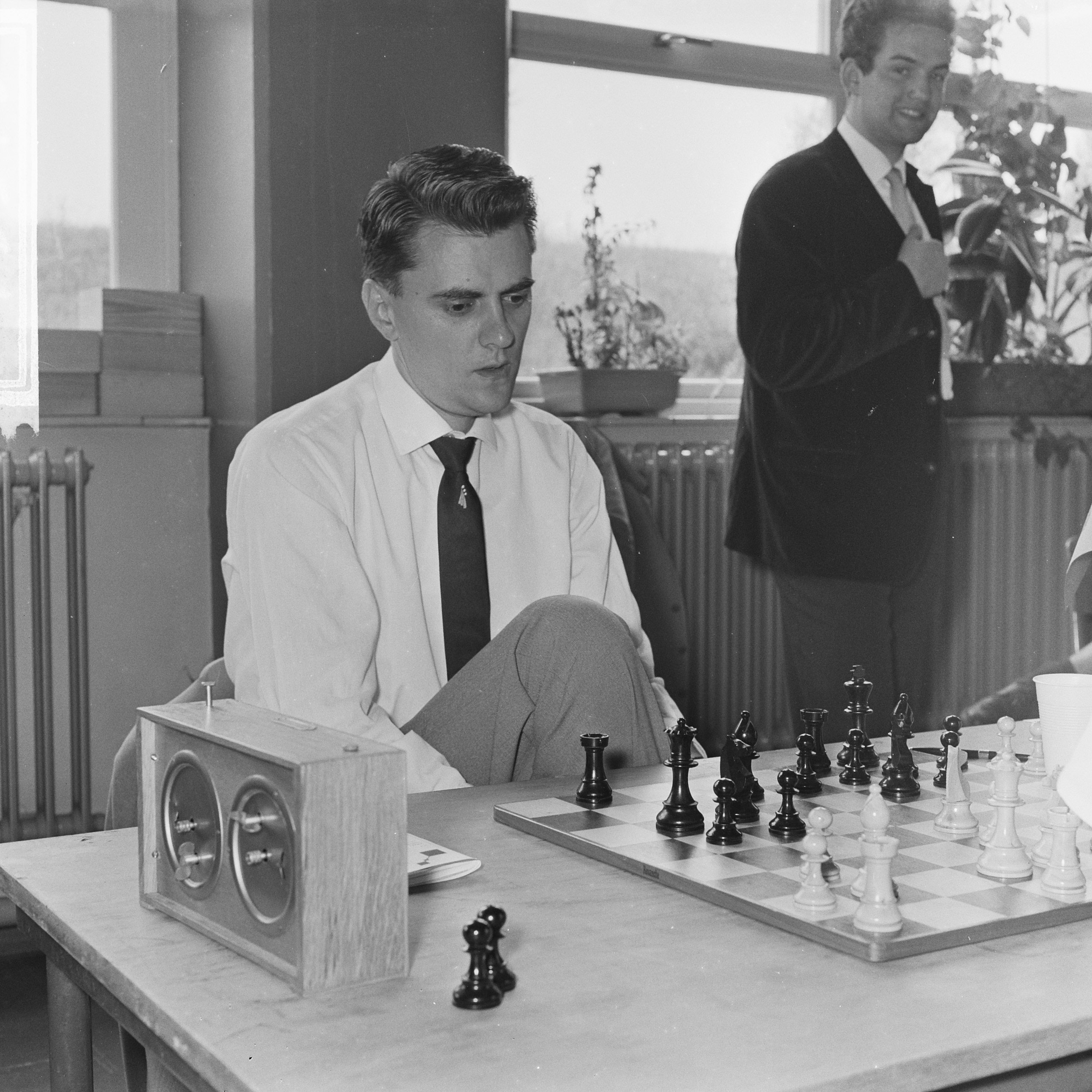 Collectie / Archief : Fotocollectie Anefo Reportage / Serie : [ onbekend ] Beschrijving : IBM schaaktoernooi, G. Hitesan (Roemenie) (Theodor Ghiţescu ??) Datum : 25 juli 1965 Locatie : Roemenië Trefwoorden : schaken, tournooien Persoonsnaam : G. Hitesan Instellingsnaam : IBM Fotograaf : Kroon, Ron / Anefo Auteursrechthebbende : Nationaal Archief Materiaalsoort : Negatief (zwart/wit) Nummer archiefinventaris : bekijk toegang 2.24.01.03 Bestanddeelnummer : 917-9979